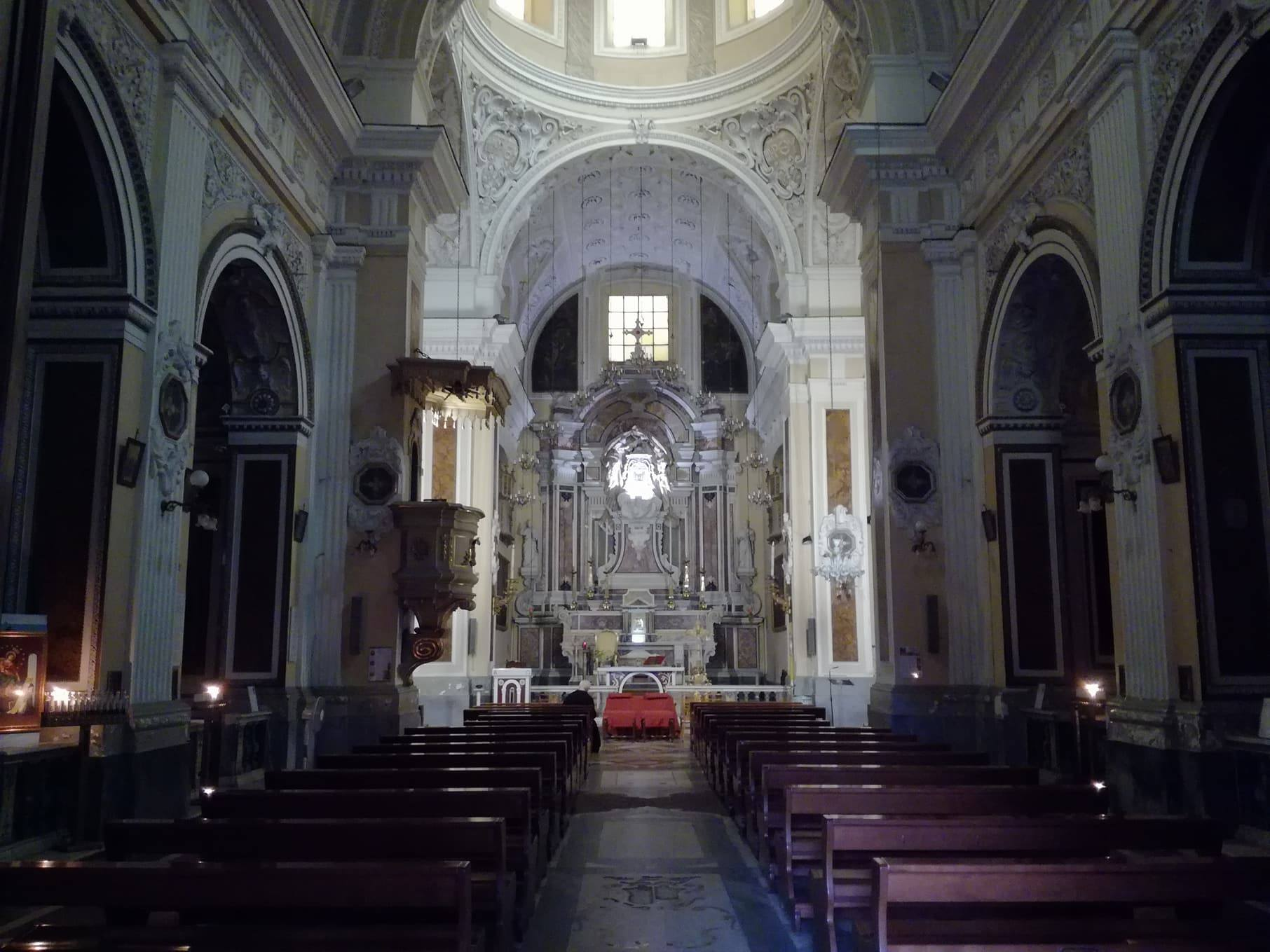 Santa Maria in Portico, Napoli.